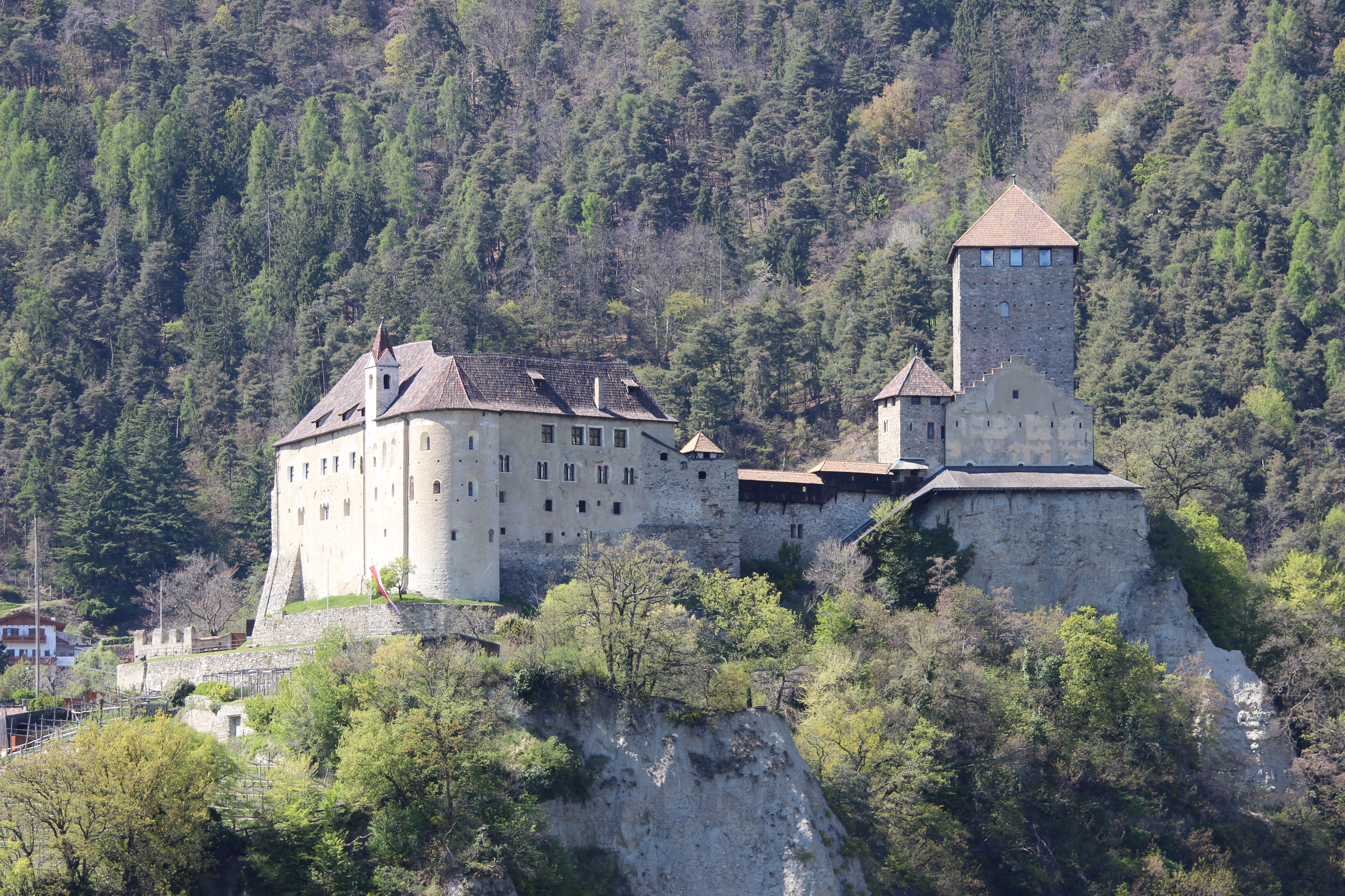 Schloss Tirol